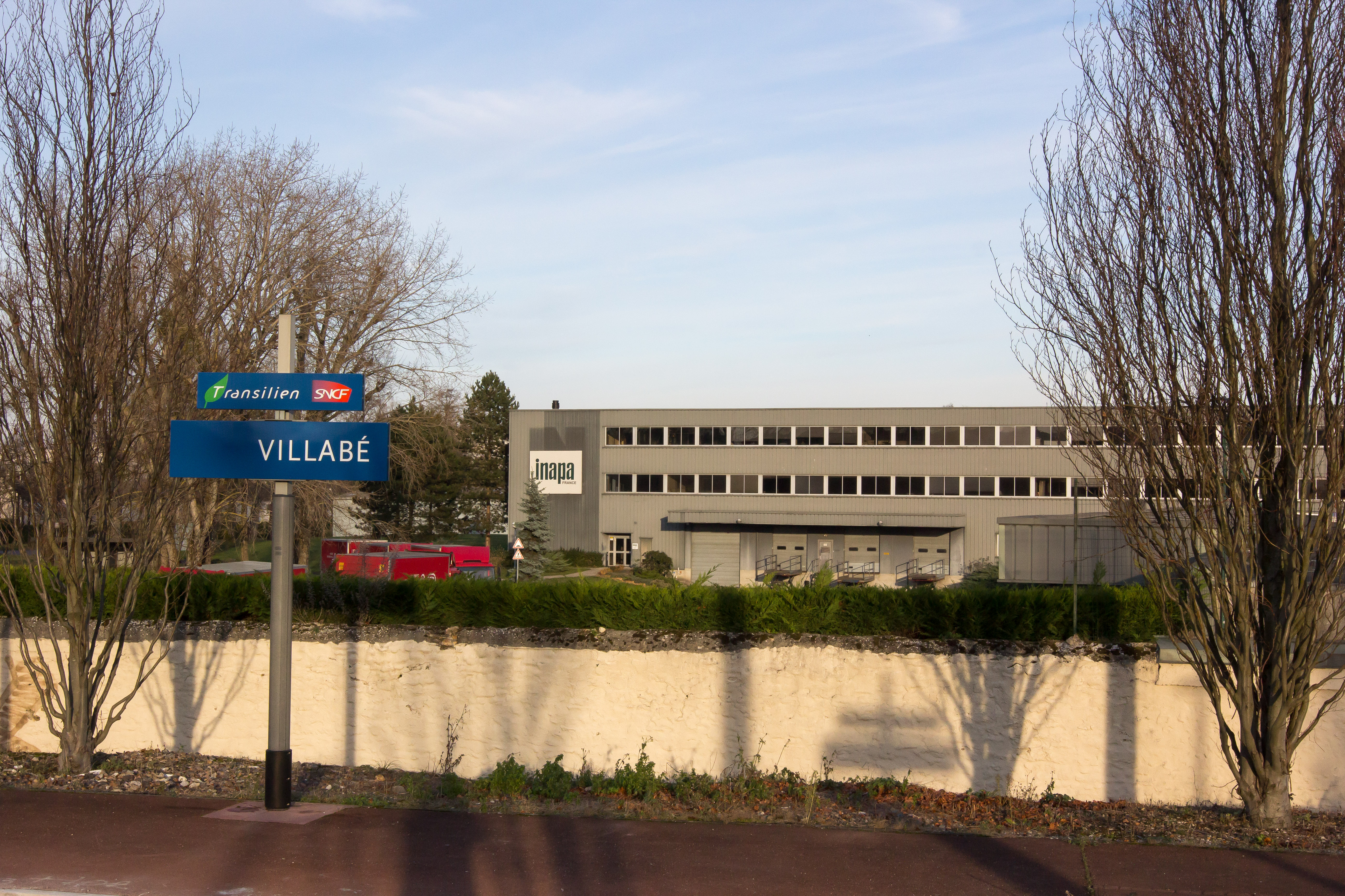 Gare de Villabé / Villabé / Essonne / France